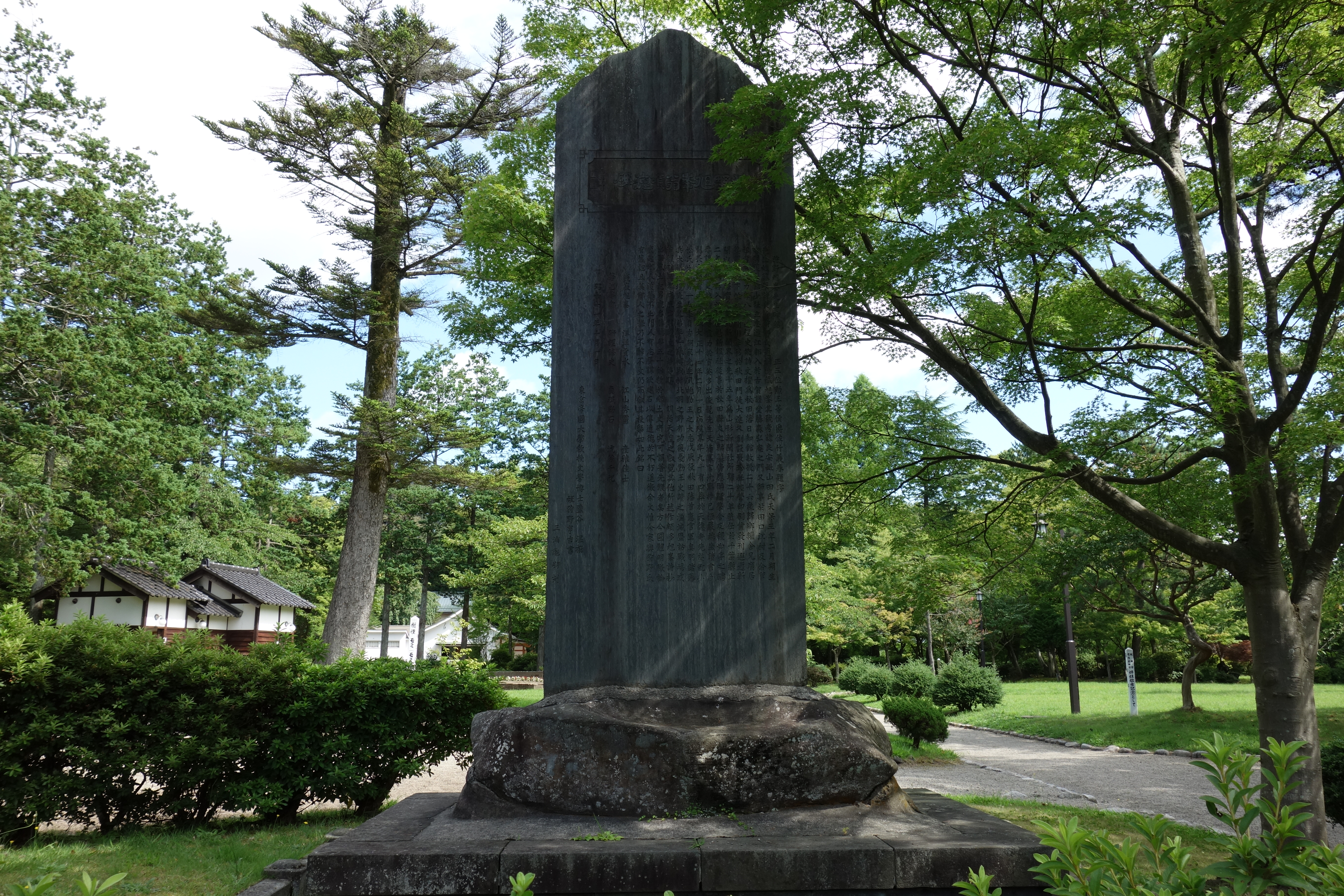 秋田市千秋公園にある狩野旭峰頌徳碑